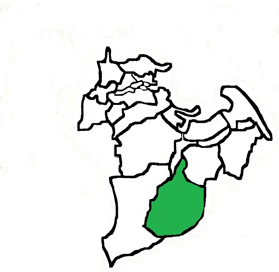 徳島県小松島市立江町の範囲